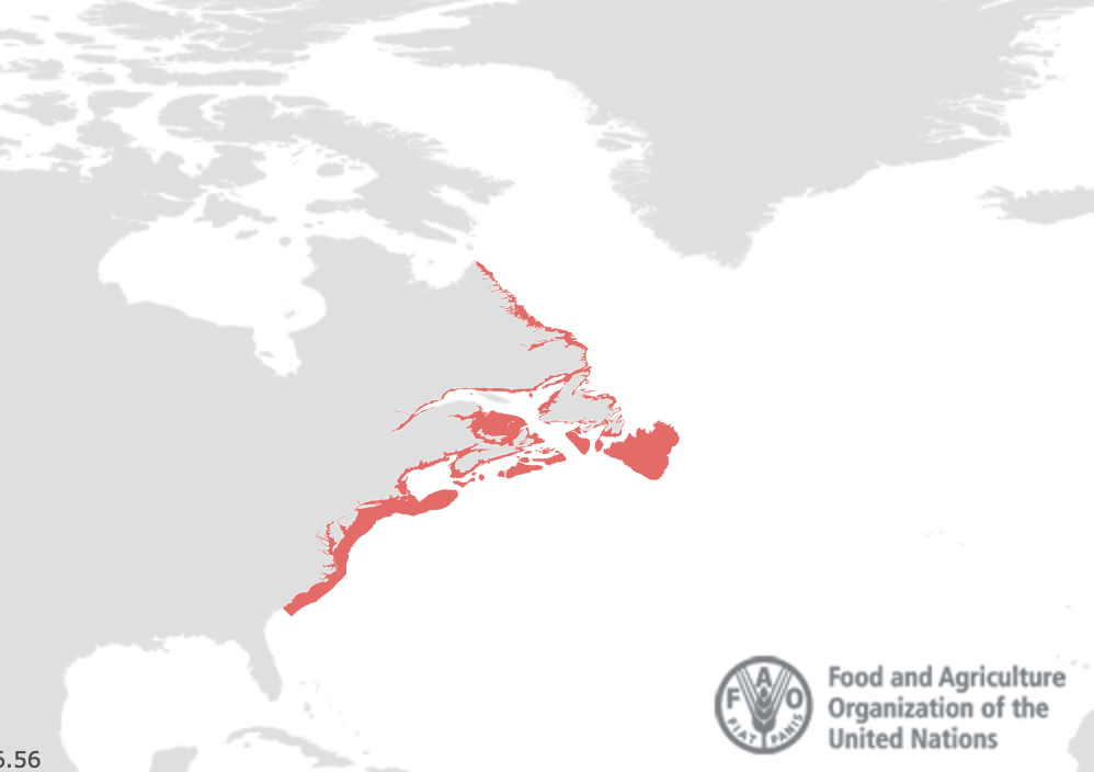 Heimkynni hafdiska